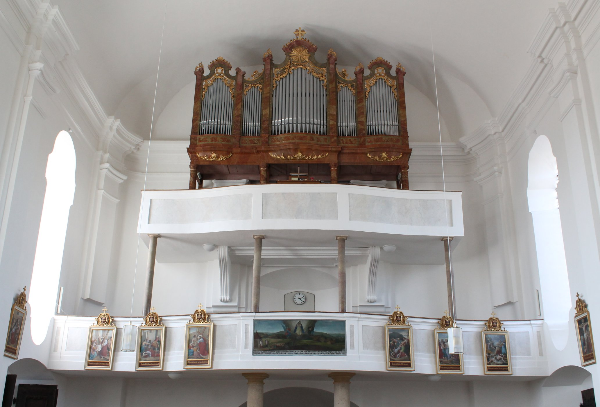 Orgel von Mariä Heimsuchung in Bockhorn (1909, F. B. Maerz, II/12)